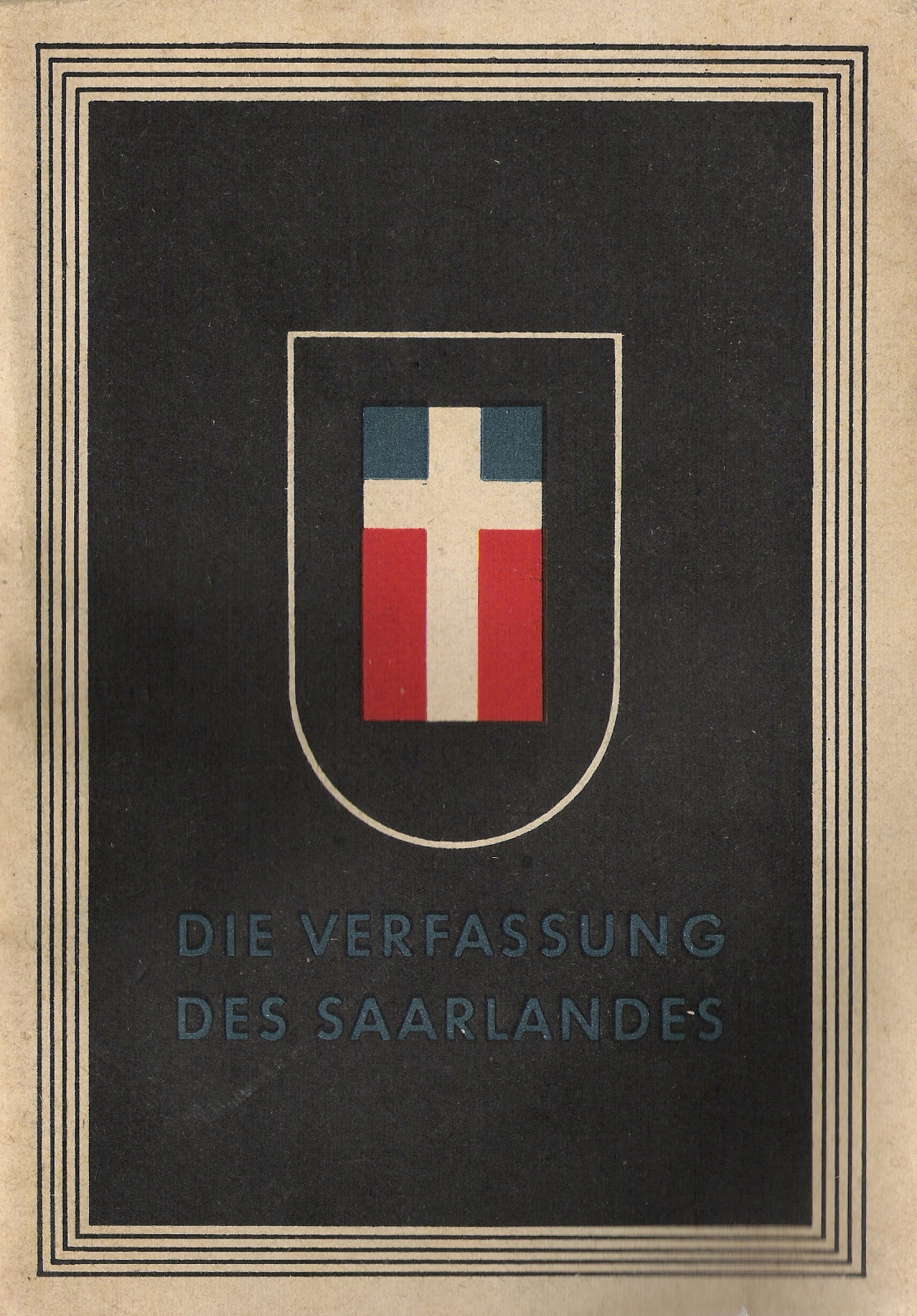 Bild der Verfassung des Saarlandes von 1948 Die Abbildung zeigt das Deckblatt der Verfassung des Saarlandes von 1948 GNU-FDL